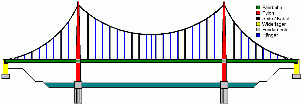 Suspension Bridge Schematic